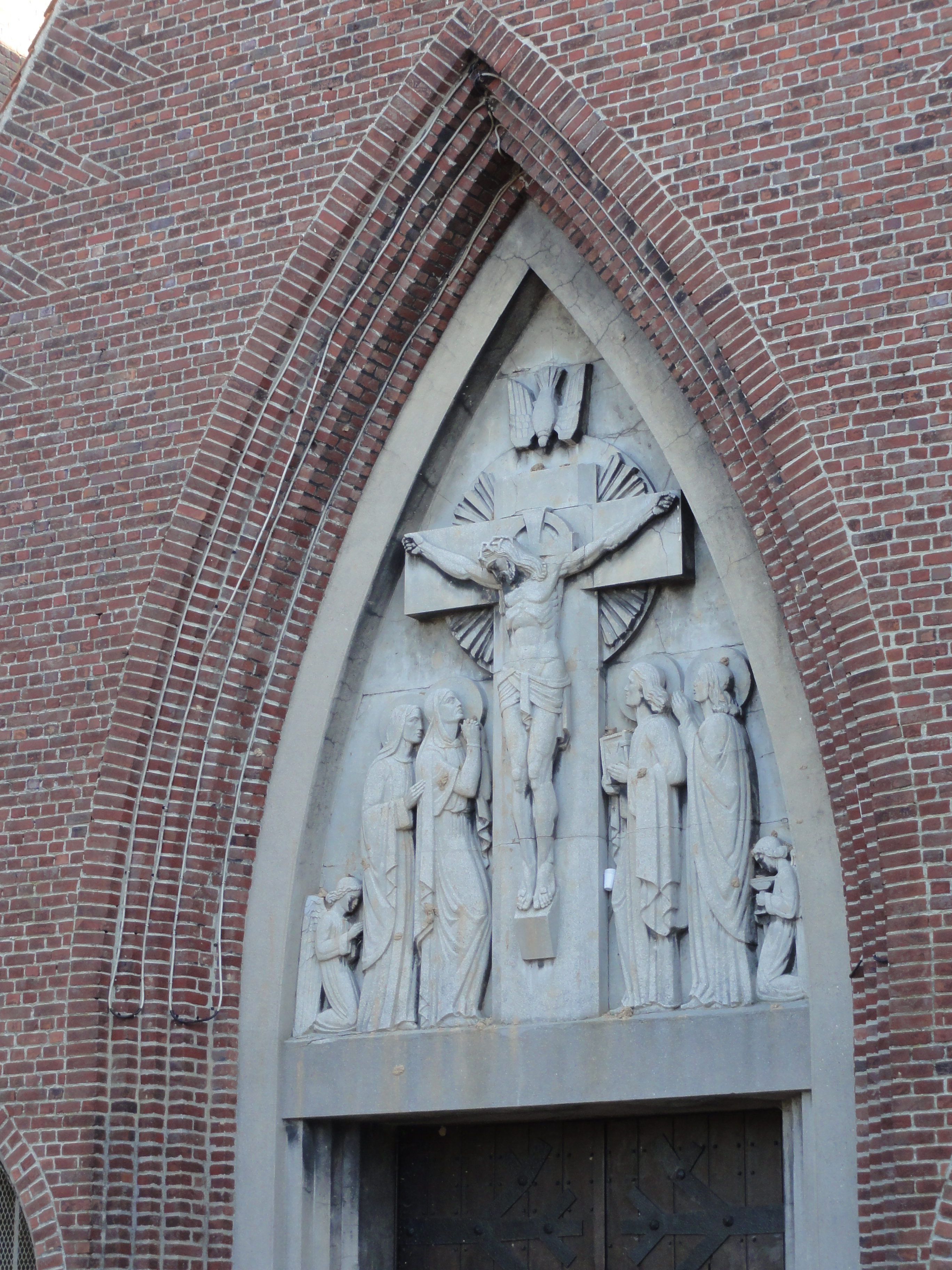 Église Sainte-Barbe des cités de la Fosse n° 1 de la Compagnie des mines de Drocourt, Drocourt, Pas-de-Calais, Nord-Pas-de-Calais, France.